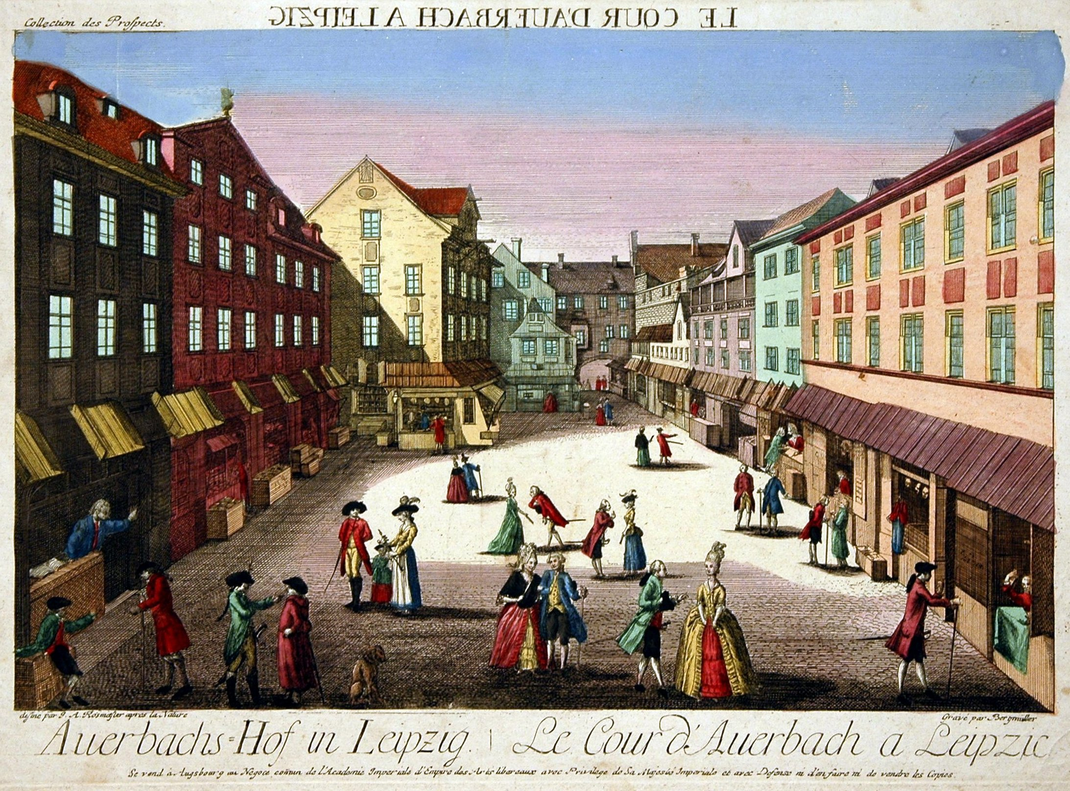 Altkolorierter Kupferstich, Guckkastenblatt (deshalb seitenverkehrt) (29,1 × 40,3 cm Plattenrand), gestochen von Johann Baptist Bergmüller (1724–1785; THIEME-BECKER Bd. 3, S.411) nach einer Zeichnung von Johann August Rosmäßler (1752–1783; THIEME-BECKER Bd. 29, S. 77). Dargestellt ist der Naschmarkt, der, wenn keine Leipziger Messe war, seinen Platz in Auerbachs Hof hatte.Uploaded with Reworkhelper